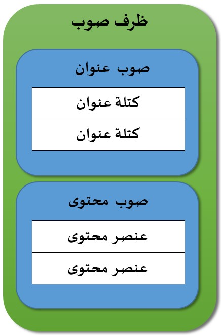 structure message Soap